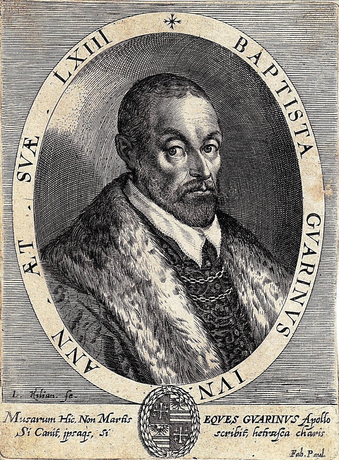 Giovanni Battista Guarini (1538–1612) Alternative names Giambattista Guarini; Giovanni Battista Guarini; Giovan Battista GuariniDescriptionItalian playwright, writer, poet and diplomatDate of birth/death 10 December 1538 7 October 1612Location of birth/death Ferrara VeniceWork period16th century date QS:P,+1550-00-00T00:00:00Z/7Work location FerraraAuthority control : Q542039 VIAF: 54142932 ISNI: 0000 0001 0901 8539 LCCN: n50033002 NLA: 36518512 MusicBrainz: 429412ea-f8a1-4555-a2d5-90814724d947 WorldCat creator QS:P170,Q542039 Gravure, dimensions pleine page 17x12,5 cm Épreuve extraite de "Il Pastor fido. Tragicommdedia pastorale" de Giovanni Battista Guarini (Venice 1602).